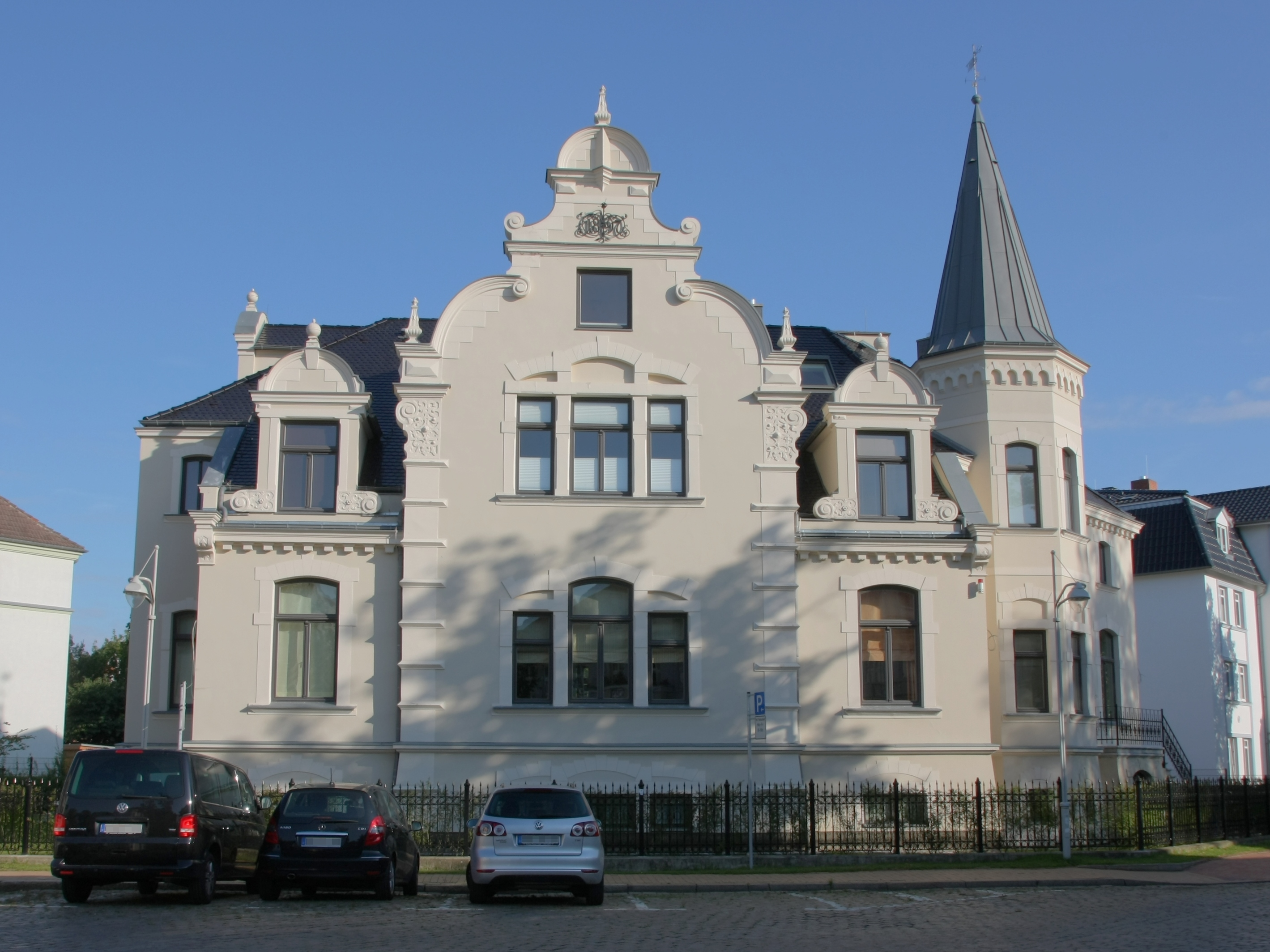 Stephanstraße 6, Rostock (Baudenkmal); 1948 Unterrichts- und Probenhaus der Hochschule für Musik und Theater